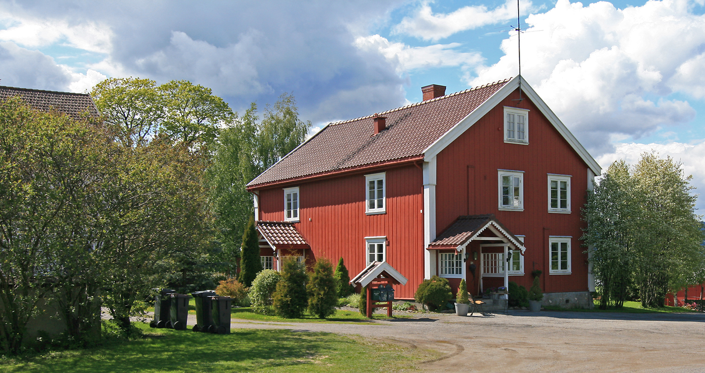 Ringsaker prestegård, forpakterboligen. 1700-tall. Freda 1991.